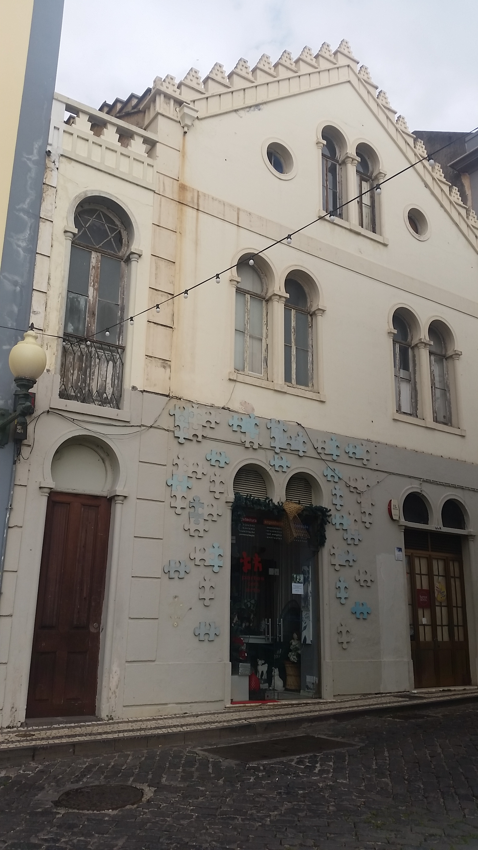 synagogue